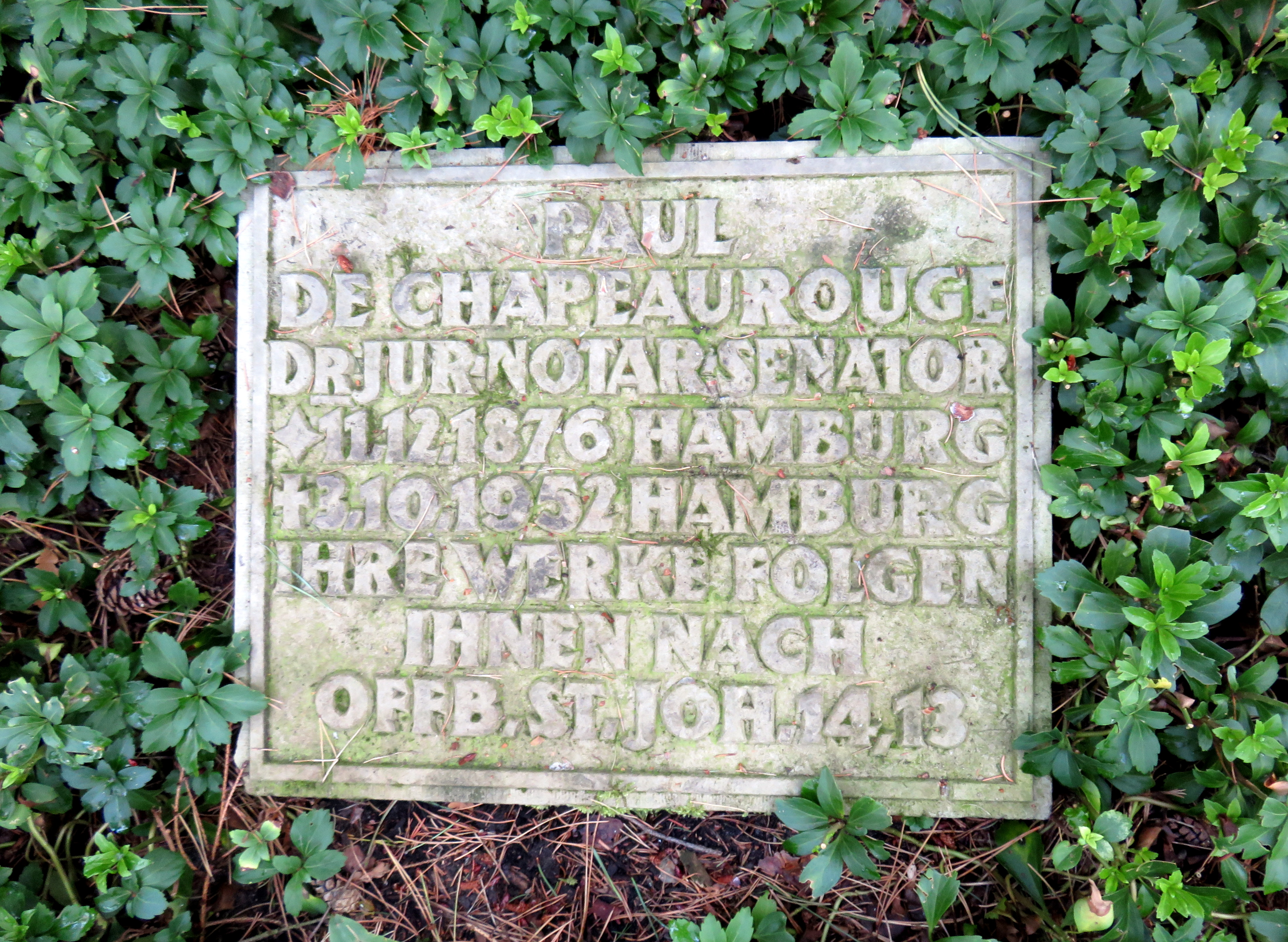 Kissenstein für den Hamburger Juristen und Senator Paul de Chapeaurouge auf der Familiengrabstätte Jacques Henri de Chapeaurouge, Friedhof Ohlsdorf, Planquadrat Q 25 (nördlich Wasserturm).